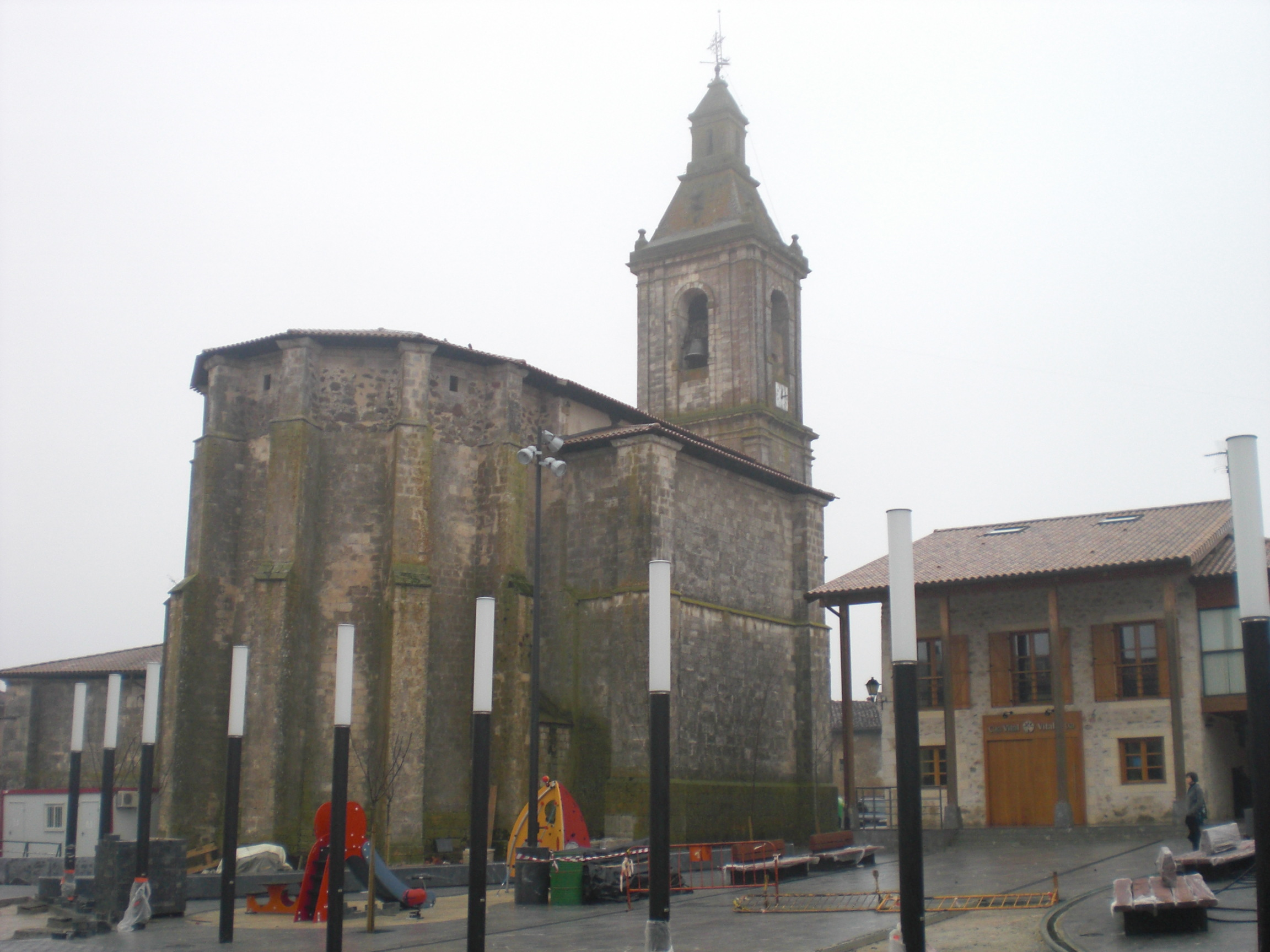 Done Bikendi Haranako eliza